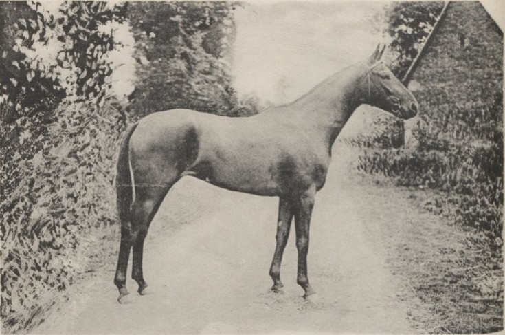 VENISE XII, Pouliche, 3 ans en 1924, baie, 1 m. 57, par Rendez-Vous, pur sang anglais, et Vertumne, pur sang, Brullemail, trotteur anglais N., Utle, trotteur anglais N. Shériff, pur sang, à M. Harmoy J.-F , du Haut-Corlay (Côtes-du-Nord) — Poids moyen